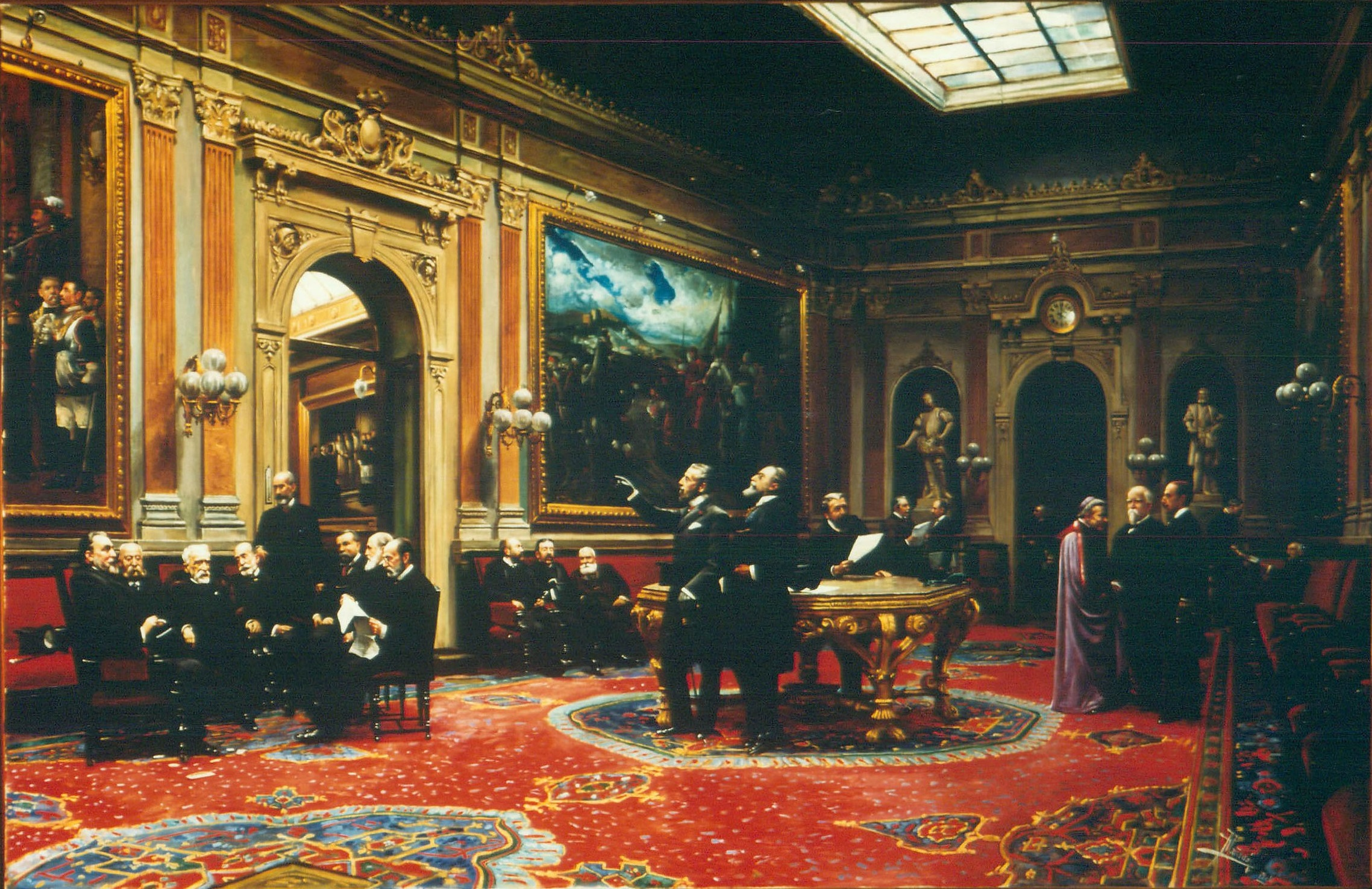 El lienzo representa el Salón de Conferencias, conocido también como el Salón de Pasos Perdidos, del Palacio del Senado de España en 1904, durante el reinado de Alfonso XIII.